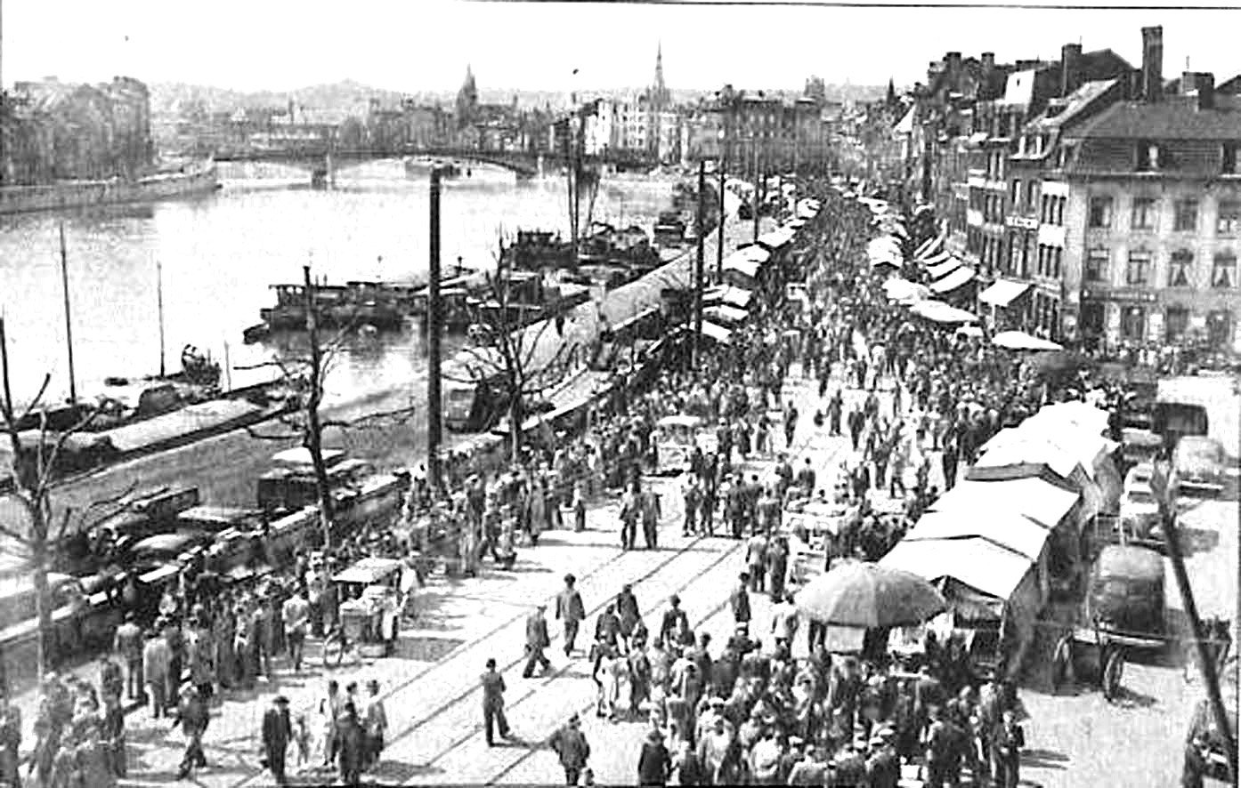 La Batte